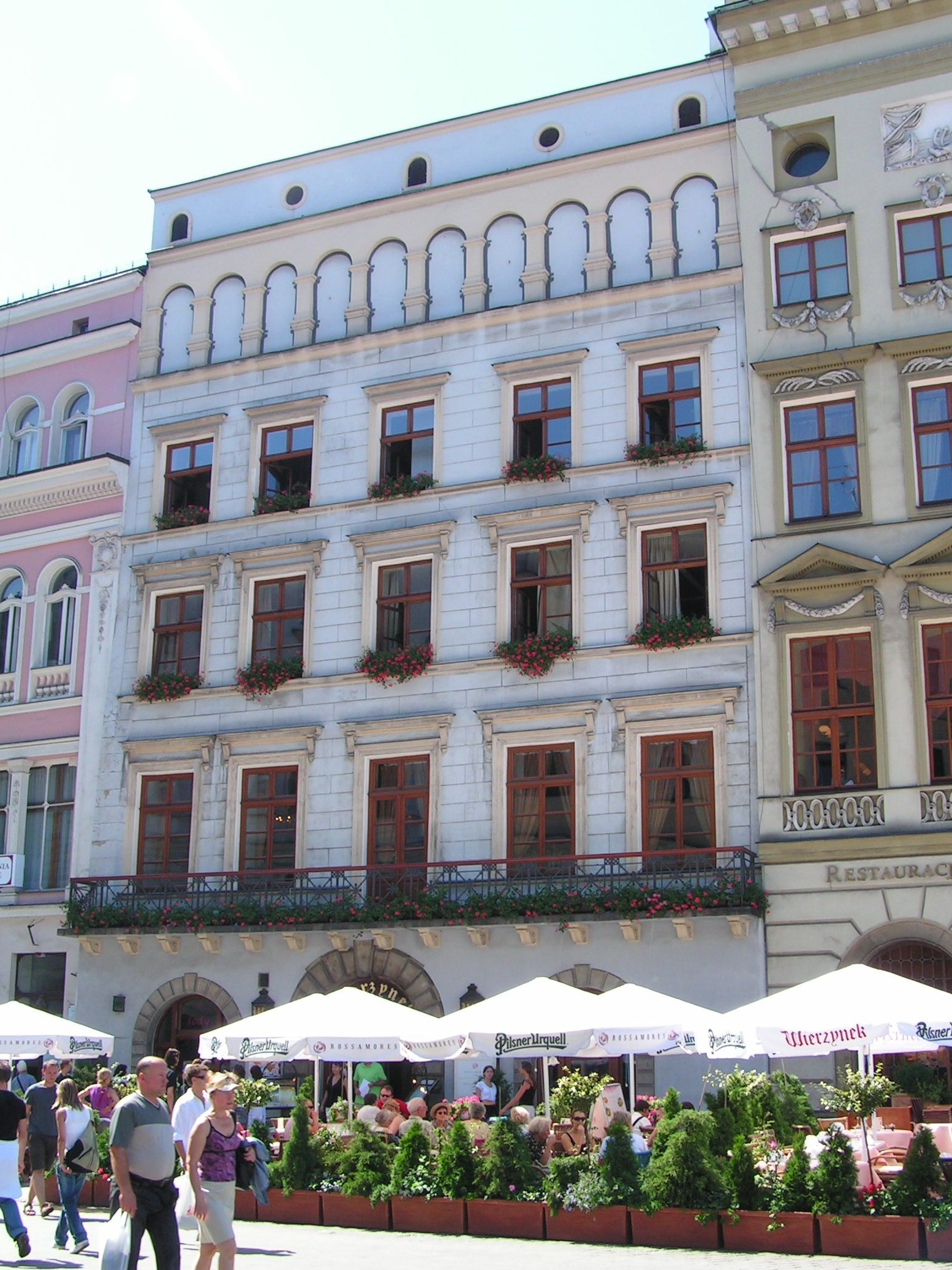 Kamienica Pinocińska, Kraków